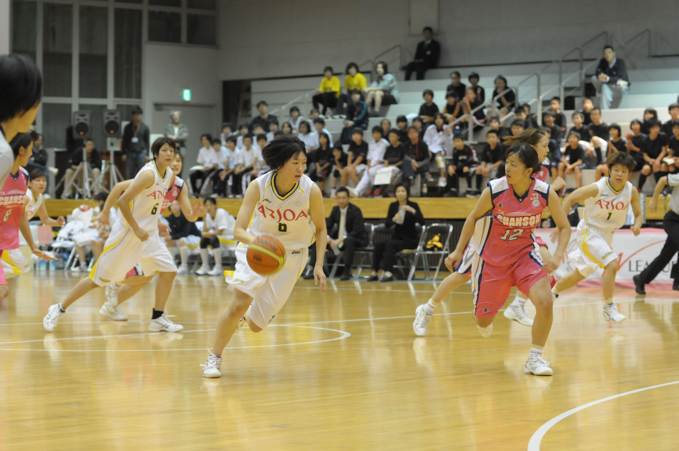 WJBL 12-13レギュラーリーグ、シャンソン対山梨。鹿角市記念スポーツセンター。